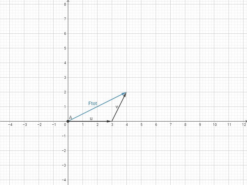 مثلث القوى, لحساب محصلة قوتين متقاطعتين